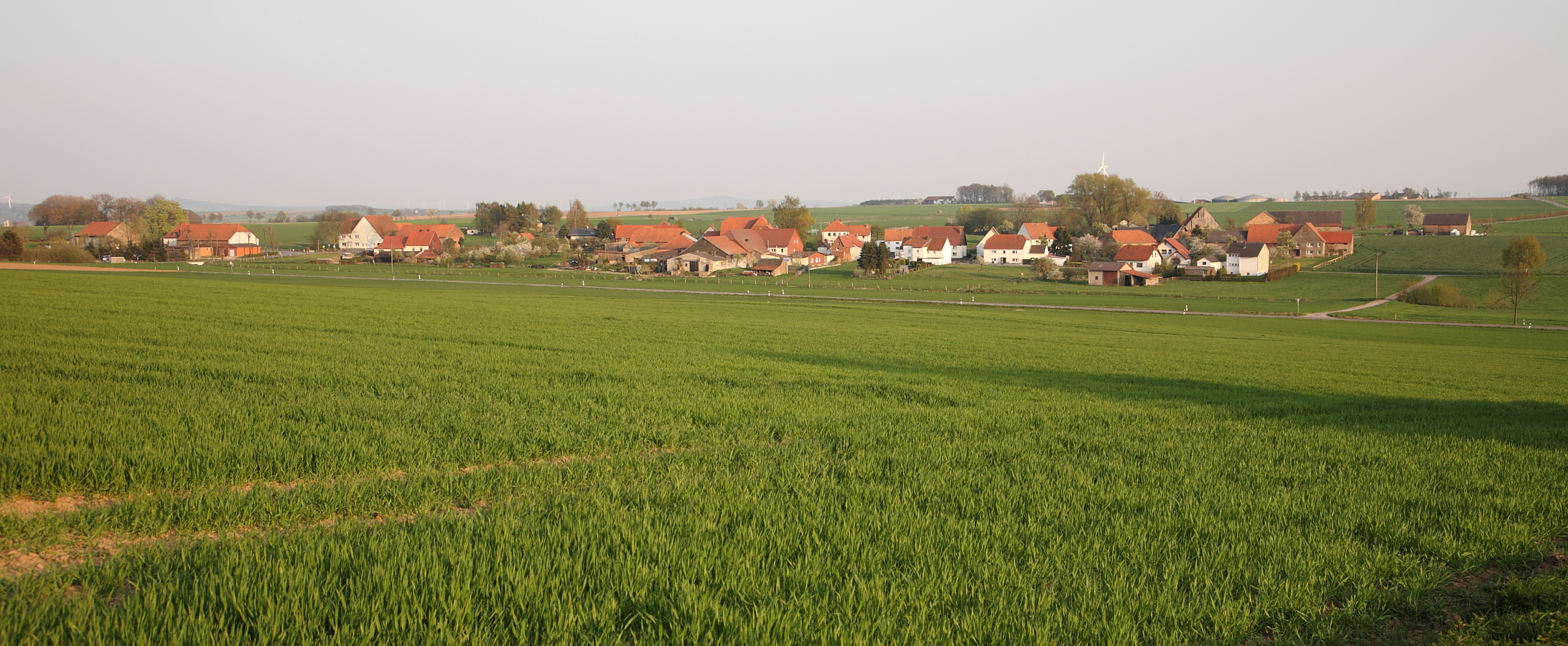 Willegassen vom Sieveringsweg/Fahlenbruch aus gesehen